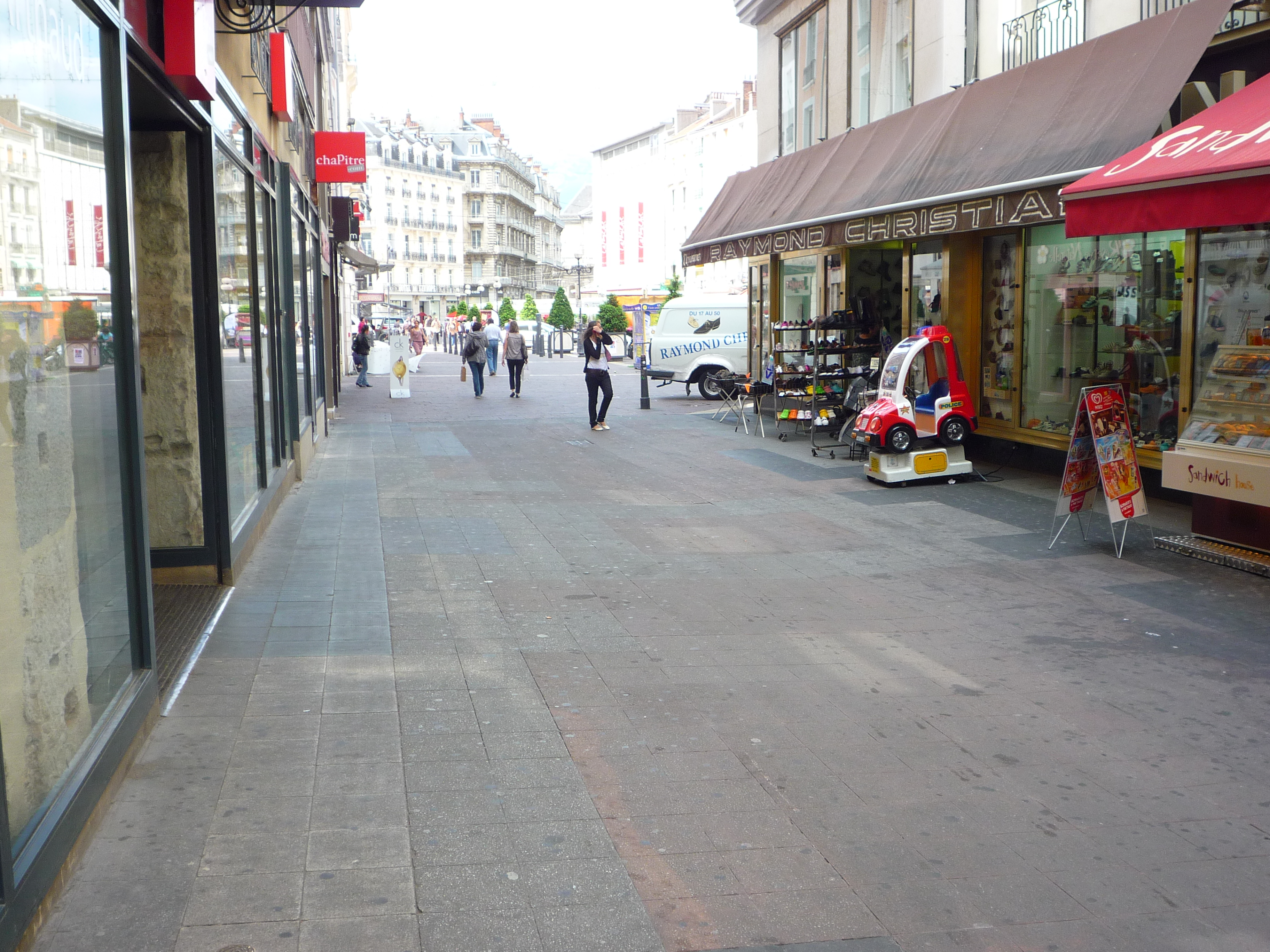 Emplacement de la porte Jovia construite à la fin du IIIe siècle, l'une des deux portes de l'enceinte romaine de Grenoble. (détruite en 1591), actuellement débouché de la Grande rue sur la place Grenette.